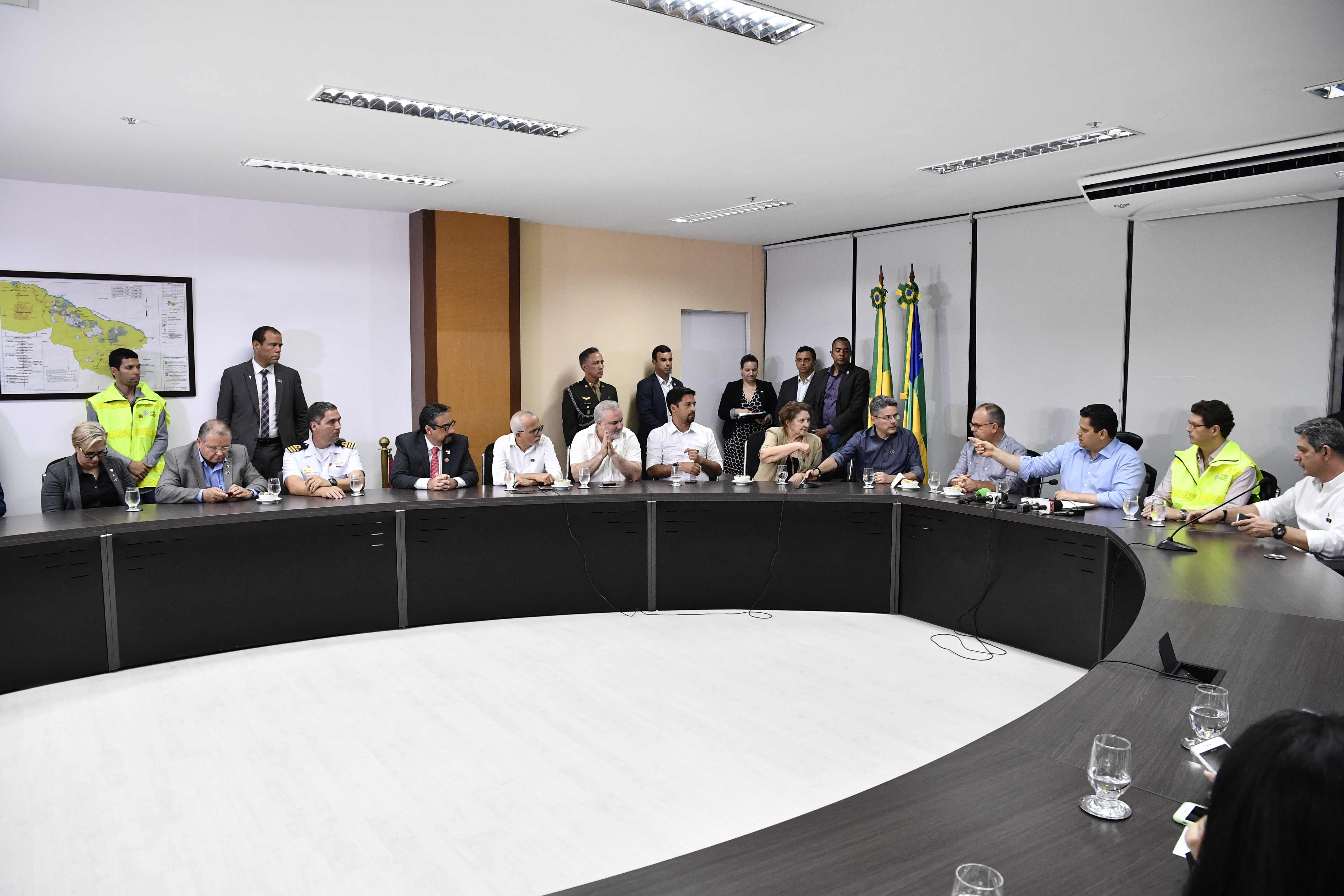 Presidente da República em exercício, senador Davi Alcolumbre (DEM-AP), assina, em Aracaju, decreto presidencial que vai prolongar por 60 dias o pagamento do seguro-defeso aos pescadores afetados pelo vazamento de óleo no litoral do Nordeste. Participam: ministro do Meio Ambiente, Ricardo Salles; senador Alessandro Vieira (Cidadania-SE); senador Fabiano Contarato (Rede-ES); senador Rogério Carvalho Santos (PT-SE); senador Jean Paul Prates (PT-RN); senadora Maria do Carmo Alves (DEM-SE). Foto: Marcos Brandão/Senado Federal